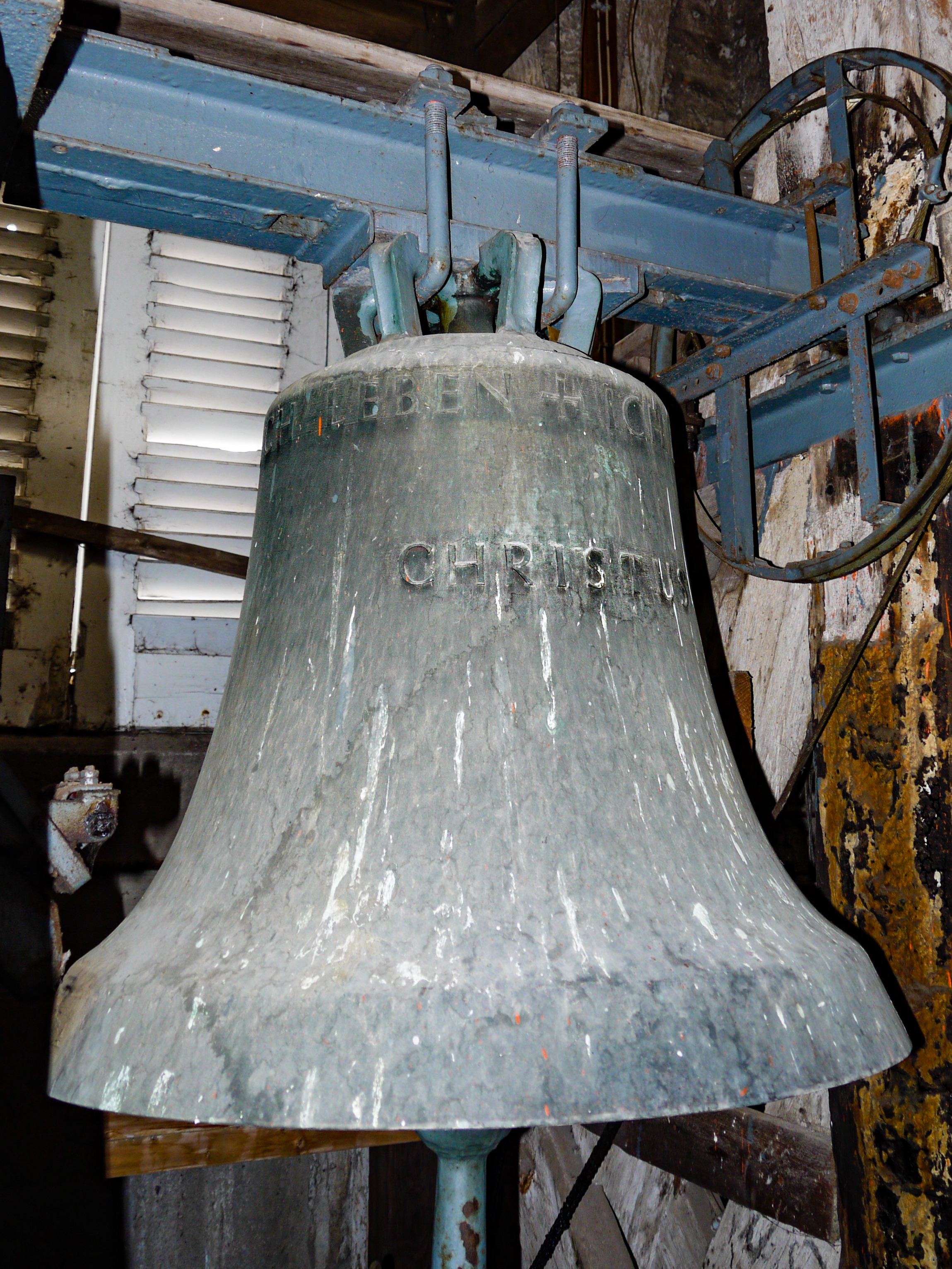 Christuskirche von Salzgitter-Gitter: die größte der drei Glocken, die Christusglocke